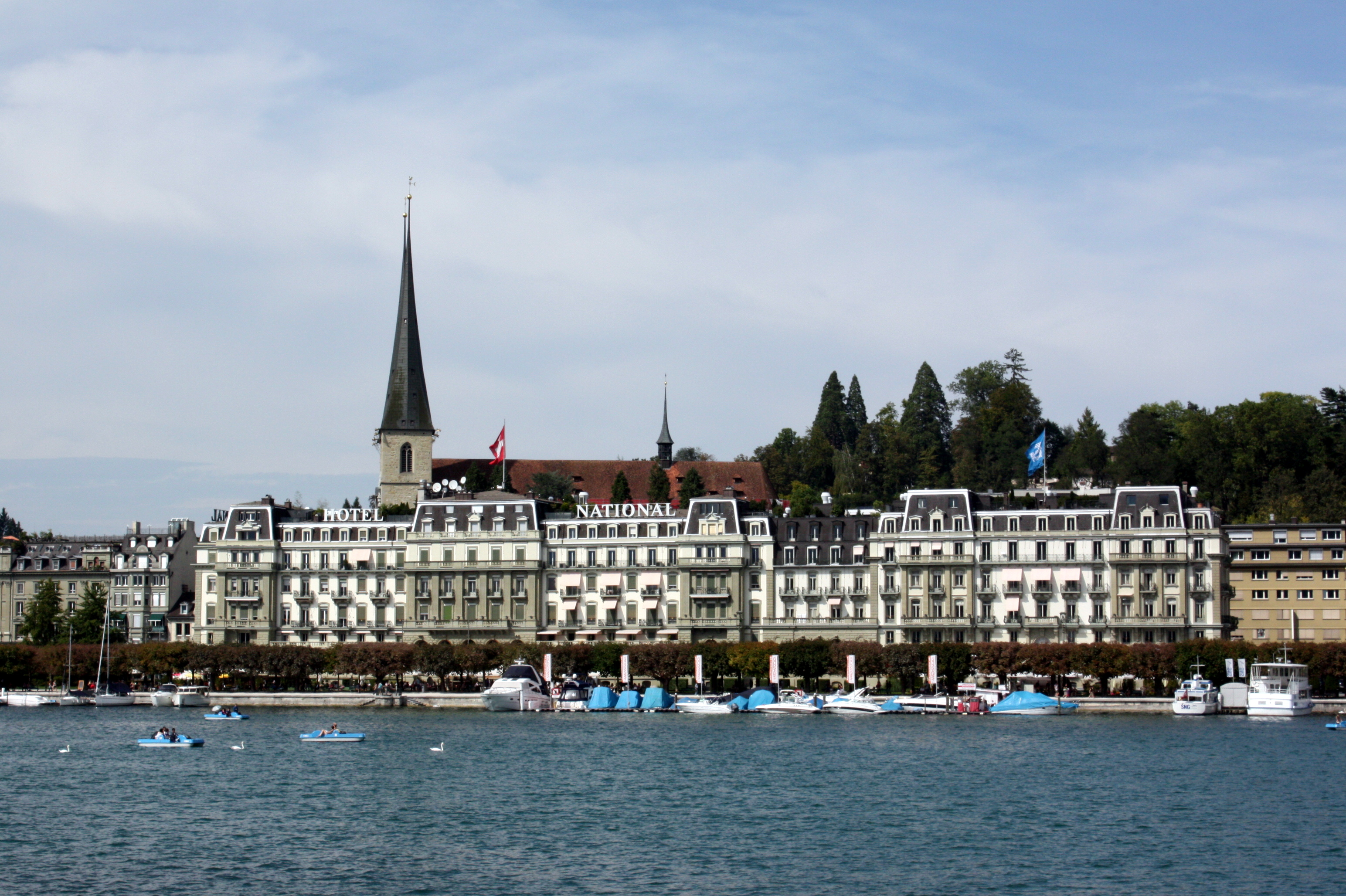 Grand-Hotel National, Luzern